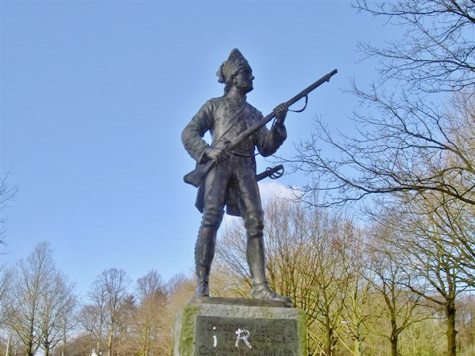 Aan de Amsterdamsestraatweg bij paleis Soestdijk